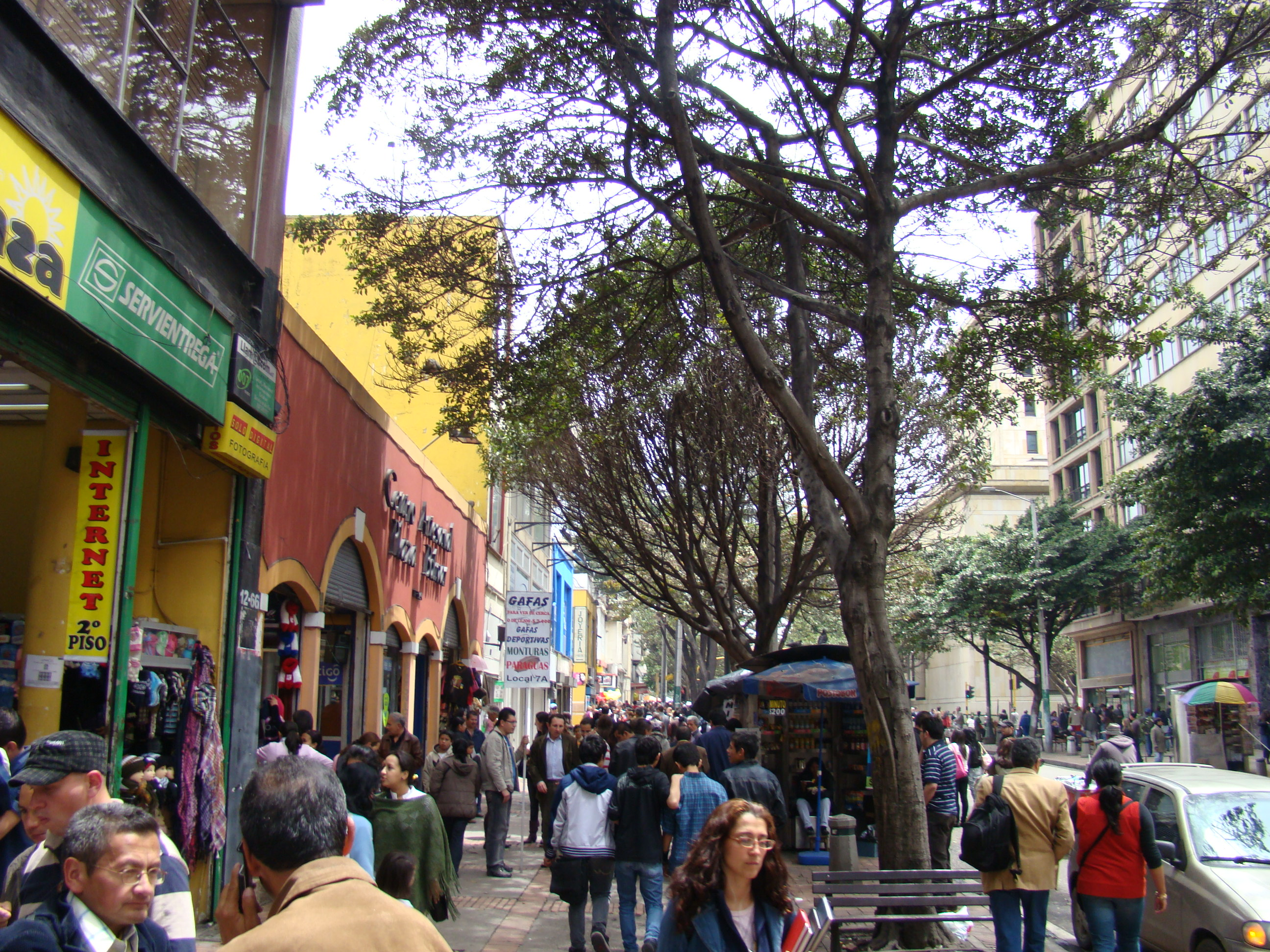 Séptima